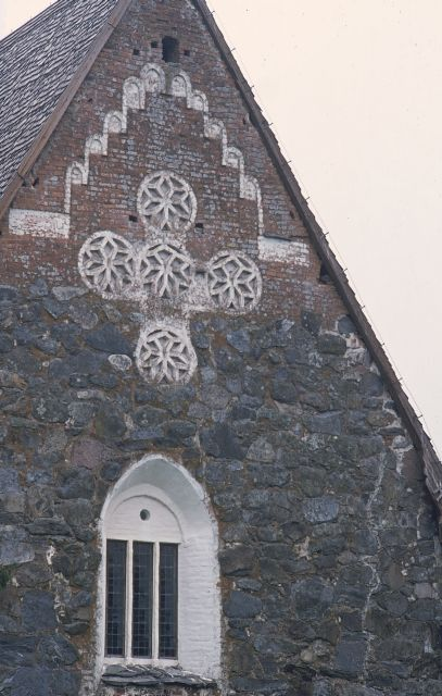 Pyhän Olavin kirkon koristeellinen ruusukeristi.